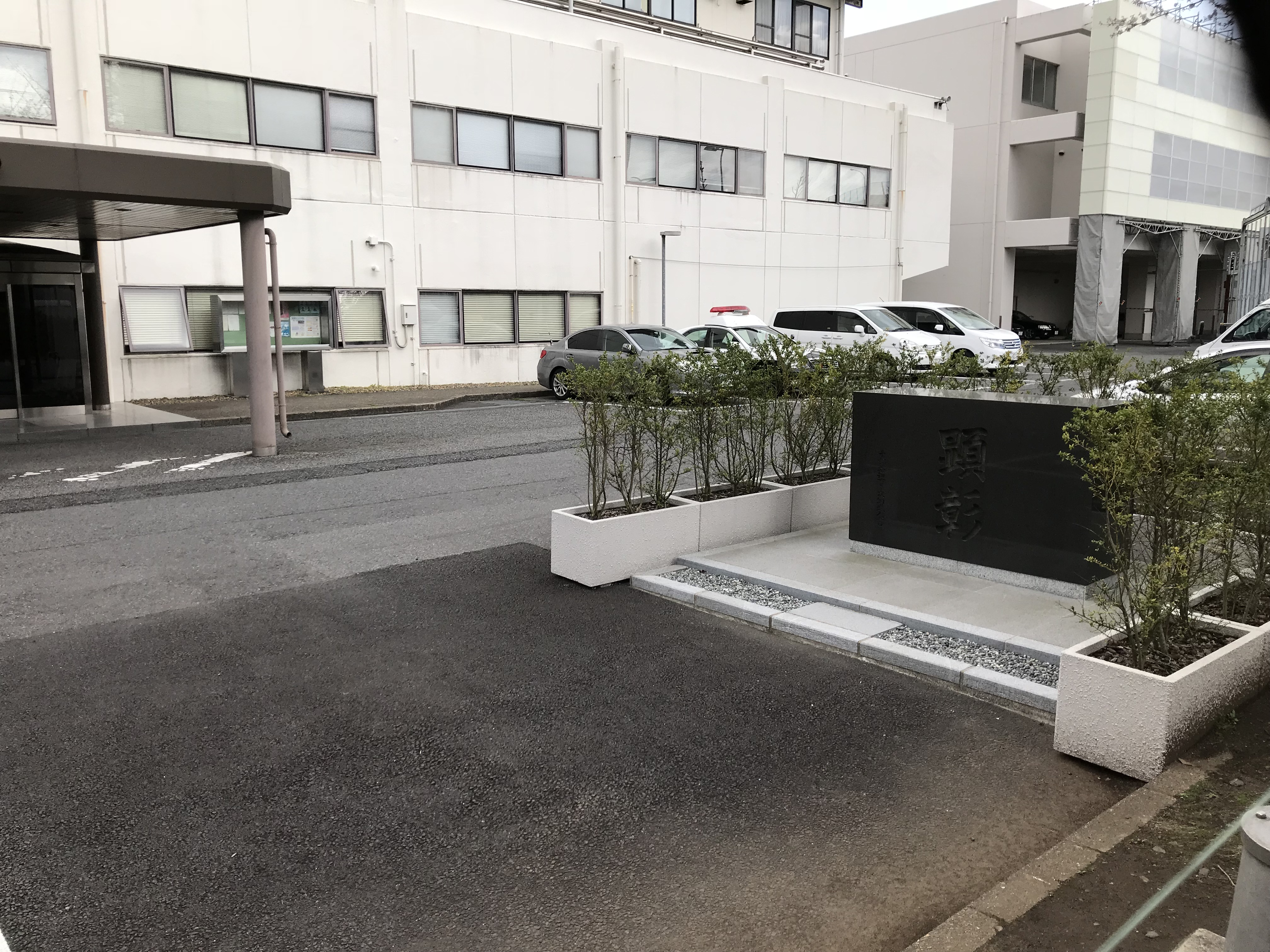 成田国際空港警察署内に設置されている、空港警備殉職者の顕彰碑。